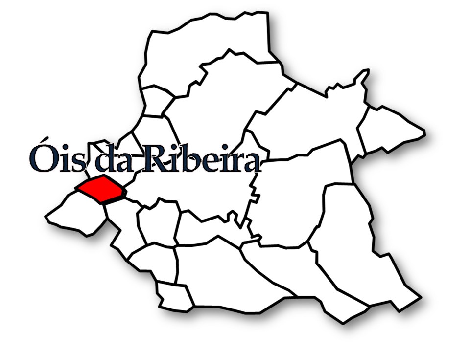 Censos 1864/2011